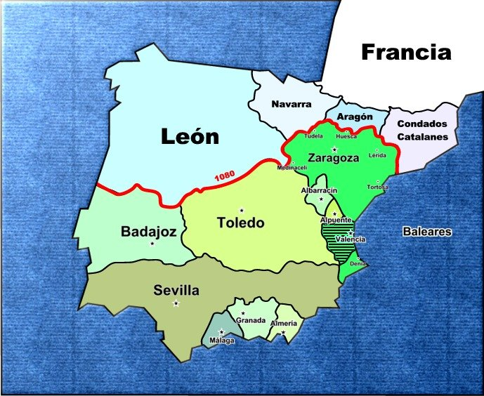 Mapa de la máxima extensión de la Taifa Hudí en época de Al-Muqtadir en 1076 Mapa de la taifa de Zaragoza hacia el año 1080.